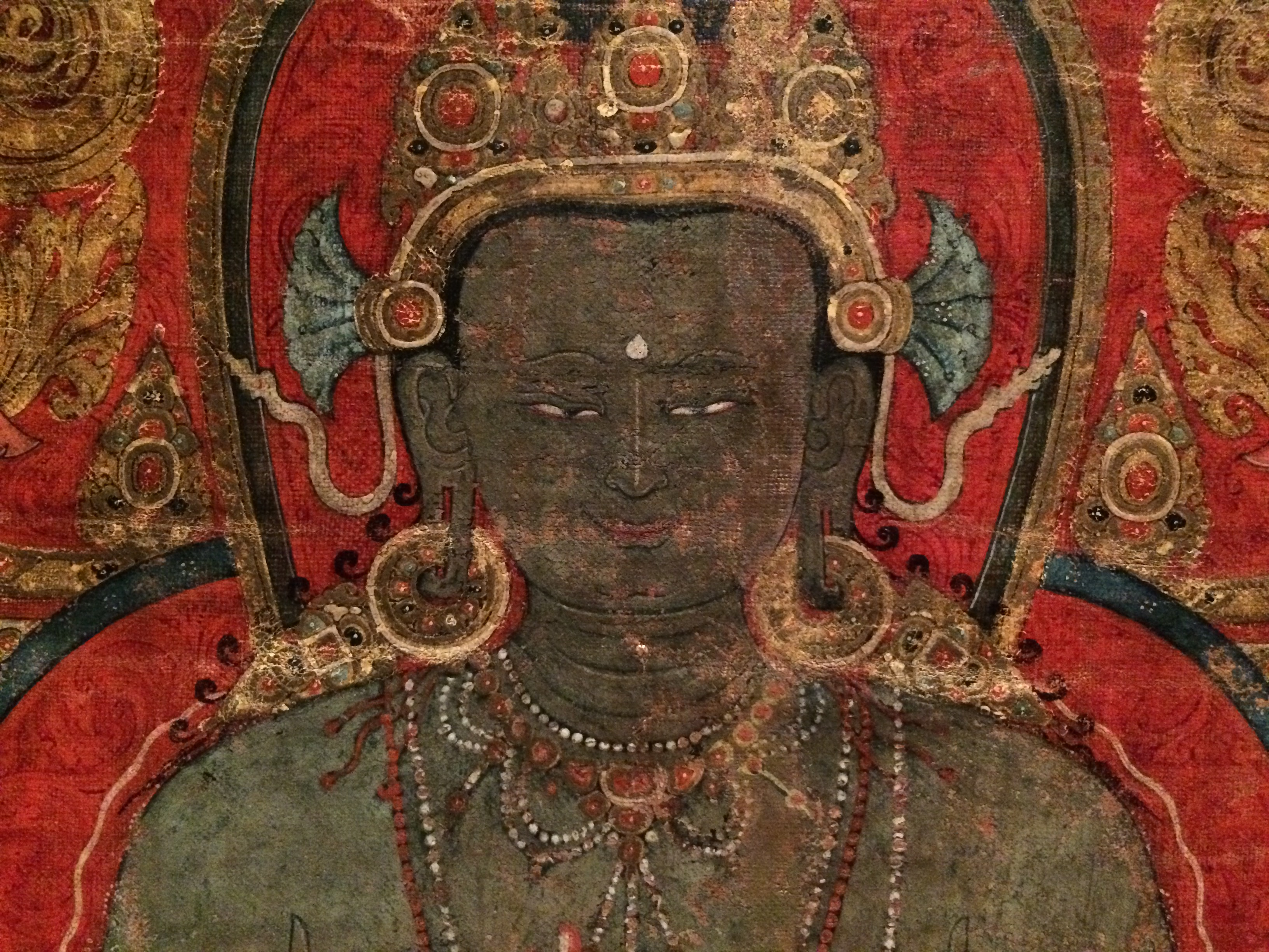 Tibetan Amoghasiddhi Buddha 1300-1400 CE